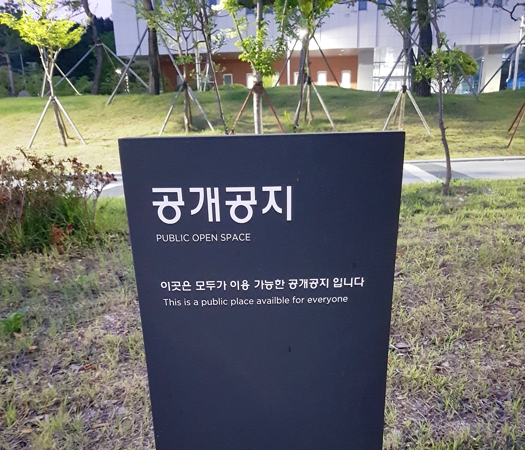 공개공지